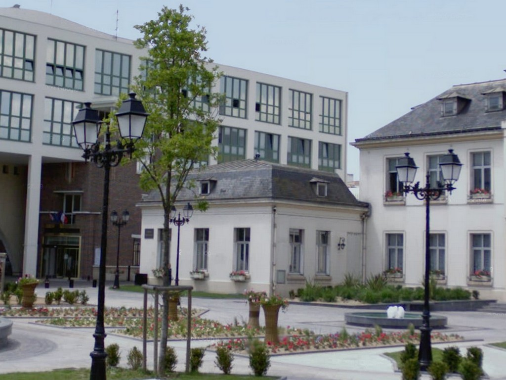 La place de la maire de Drancy